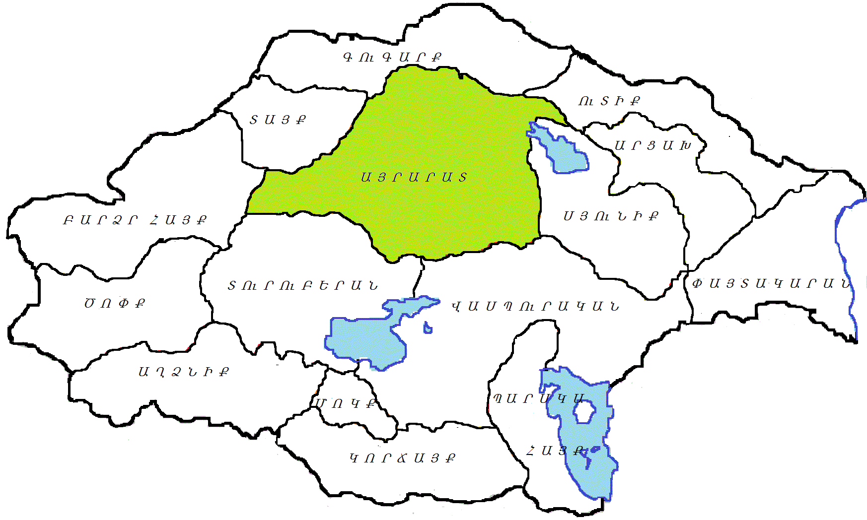 Այրարատ, Մեծ Հայք